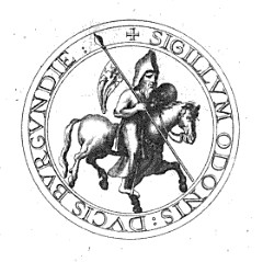 Odo I. Burgundský